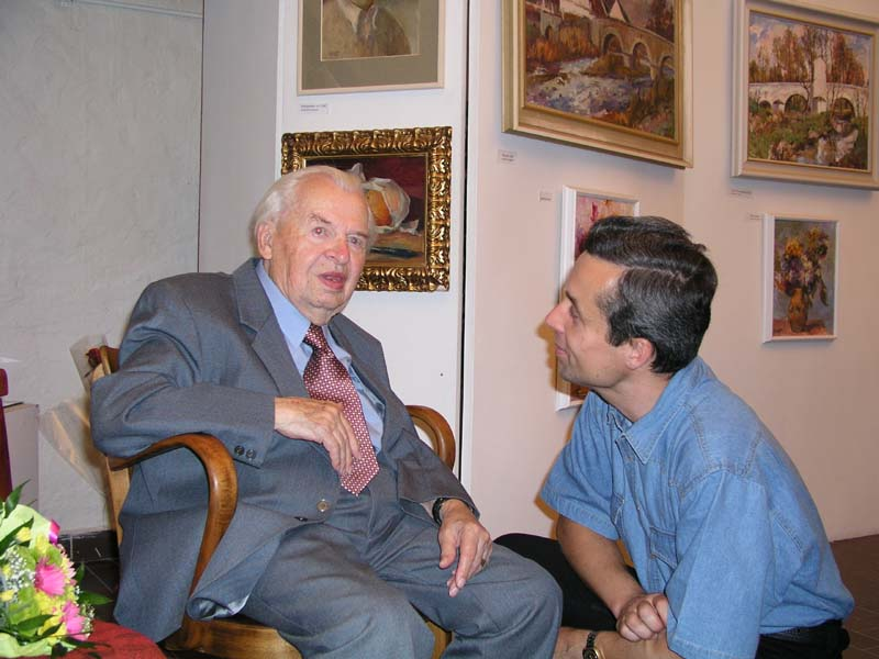 Josef Sahula 2003